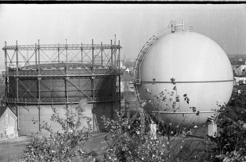 Erdgasspeicher an der Ernestinenstraße, Ecke Ostring in Gaarden